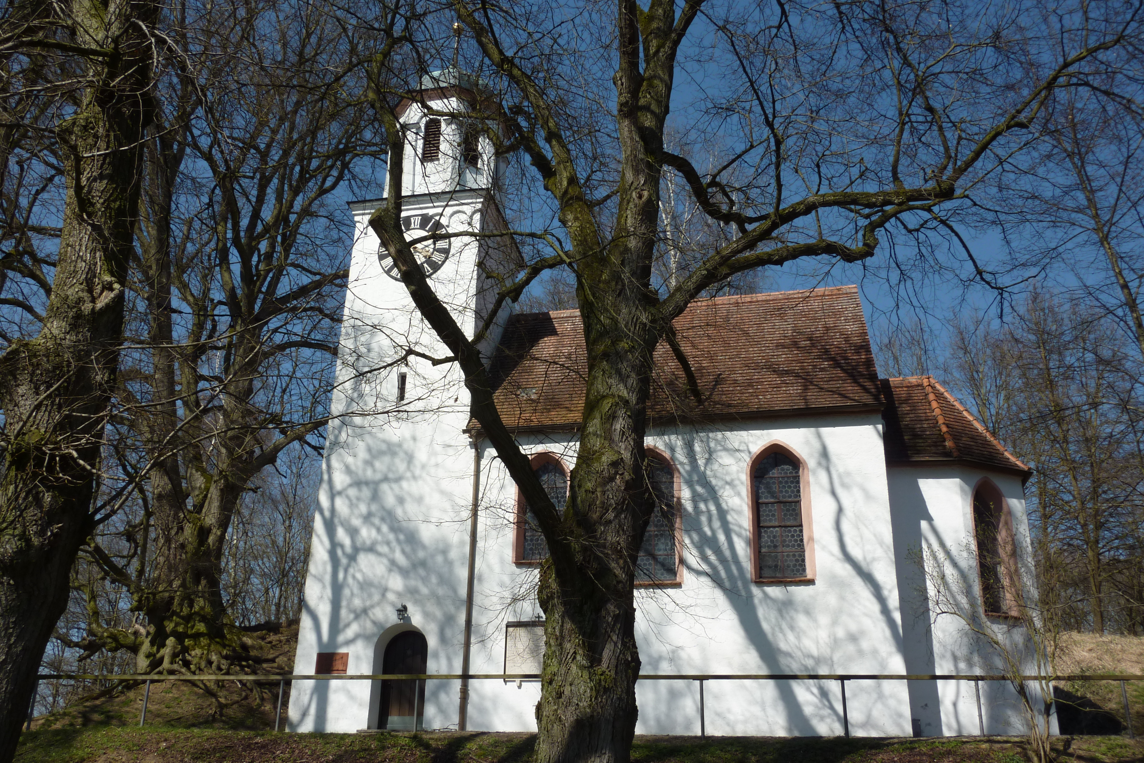 Schlosskapelle St. Georg in Hohenreichen, einem Ortsteil von Wertingen